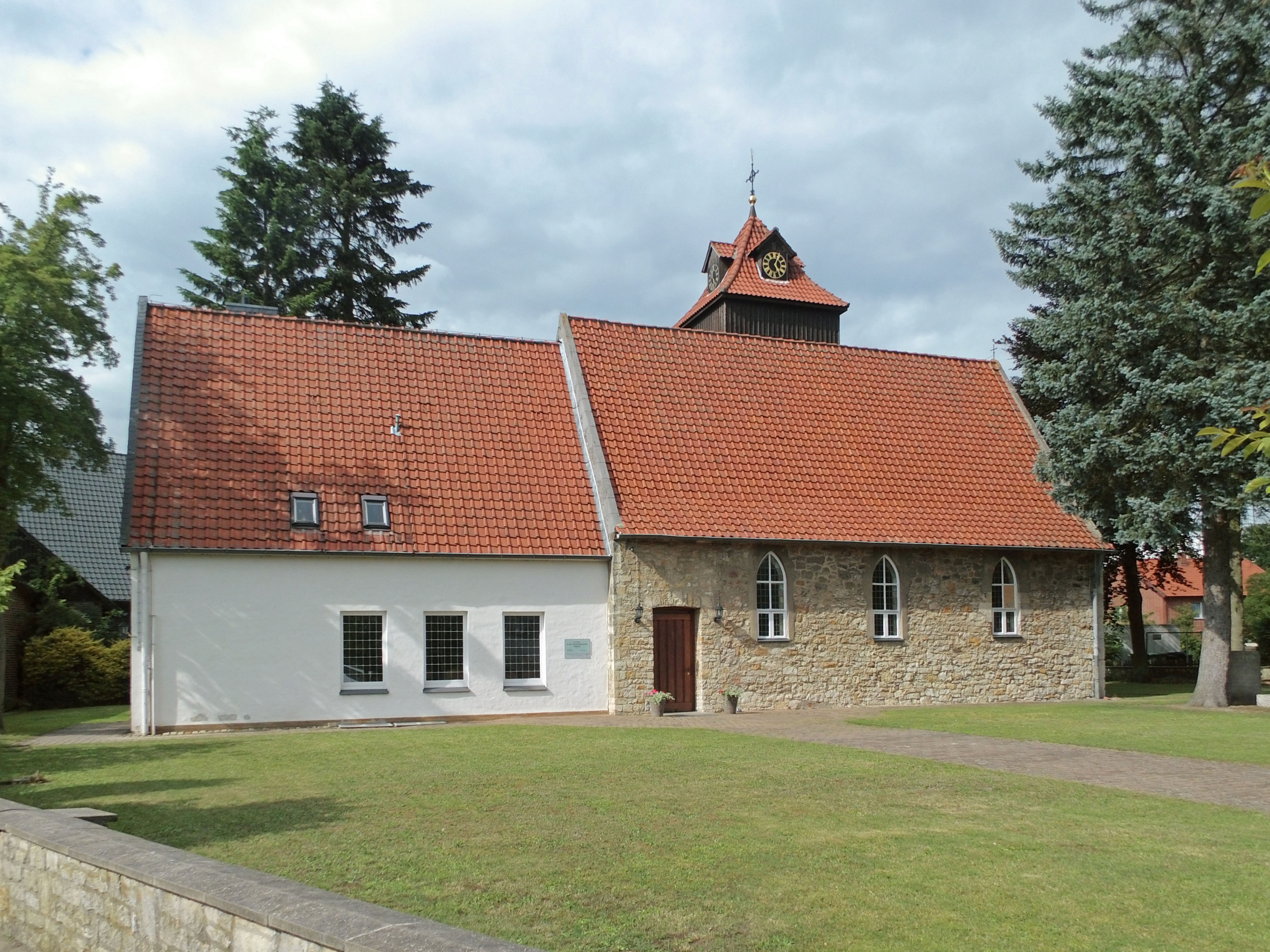 Evengelisch-lutherische Kirche in Hillerse (Landkreis Gifhorn)